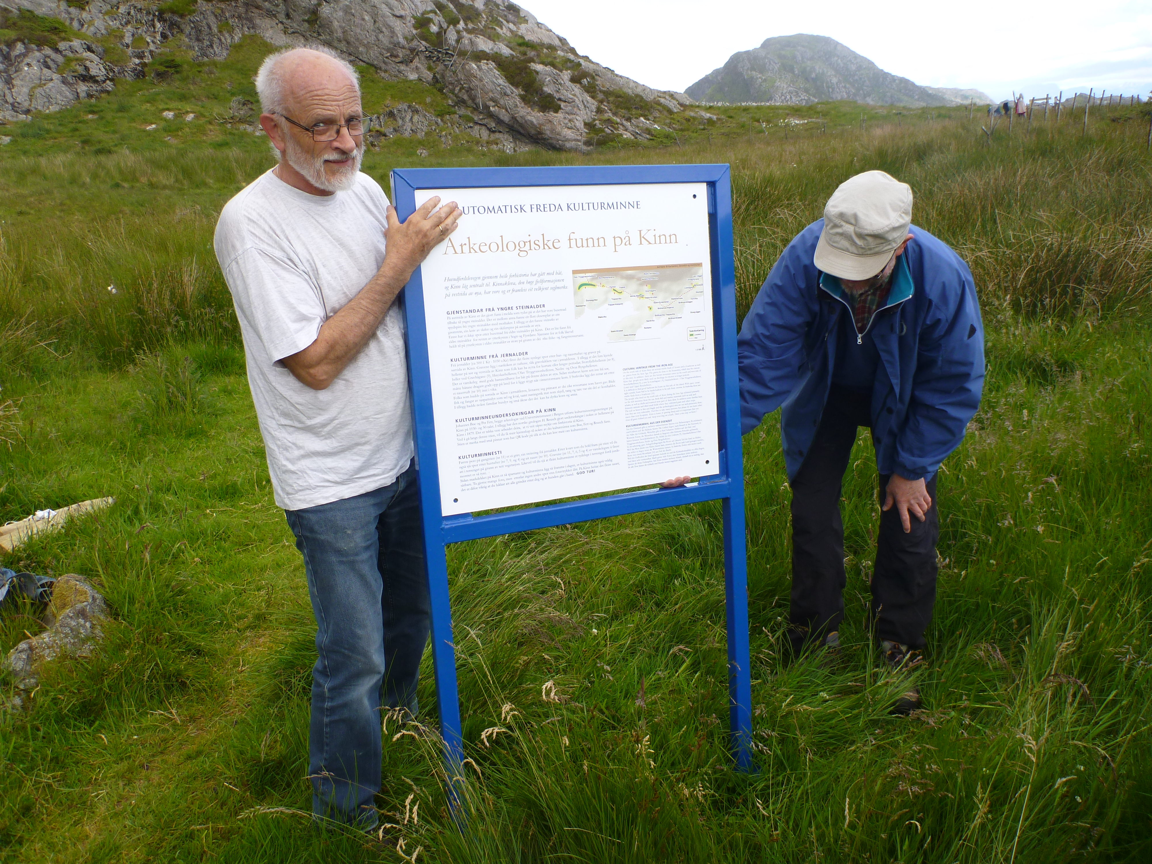 Kulturminneskiltet står på sørsida av øya ved starten av turstien som går rundt Kinn.